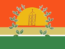 Bandera del municipio Miranda, estado Carabobo, Venezuela